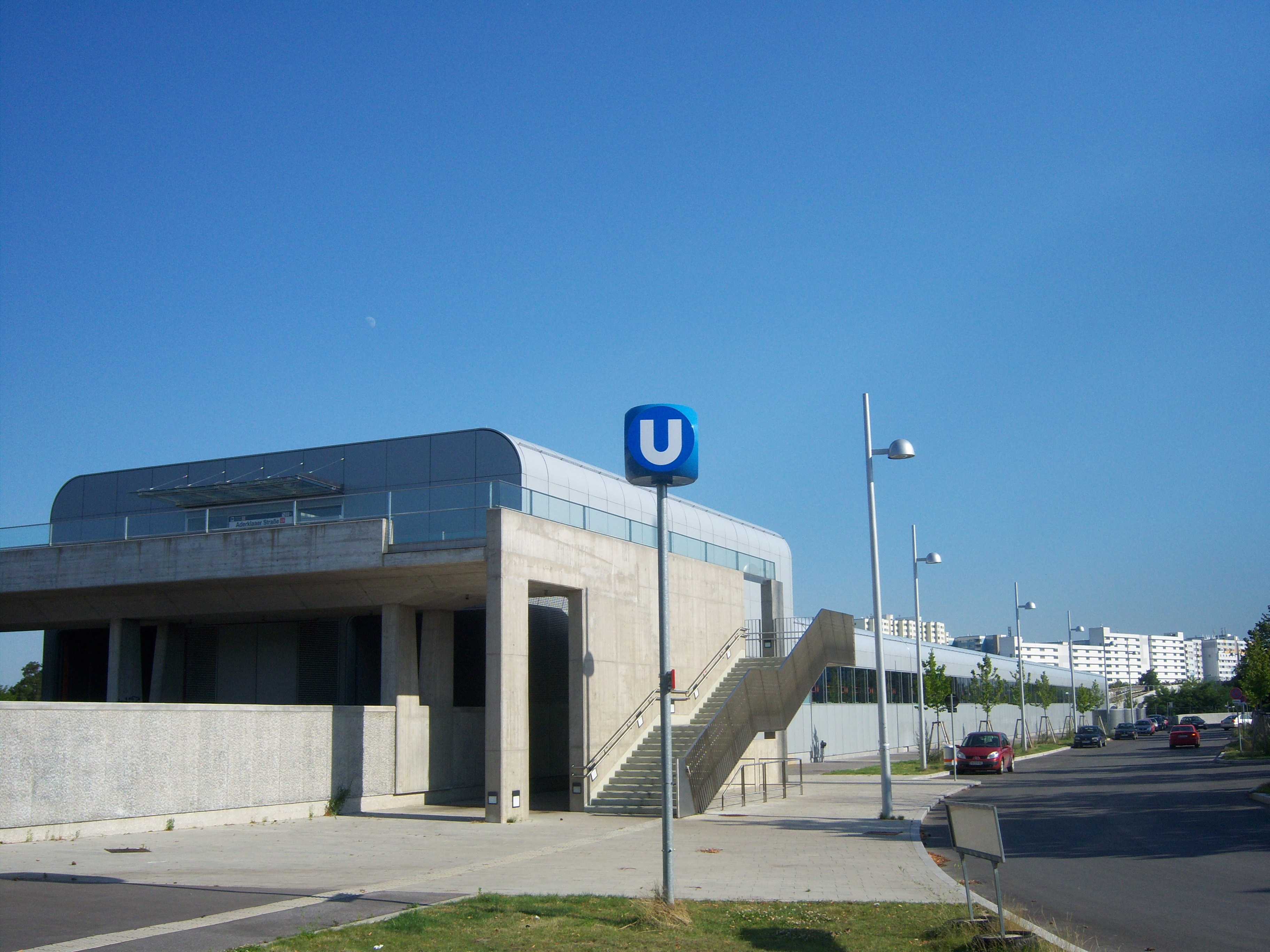 U1 Station Aderklaaer Straße